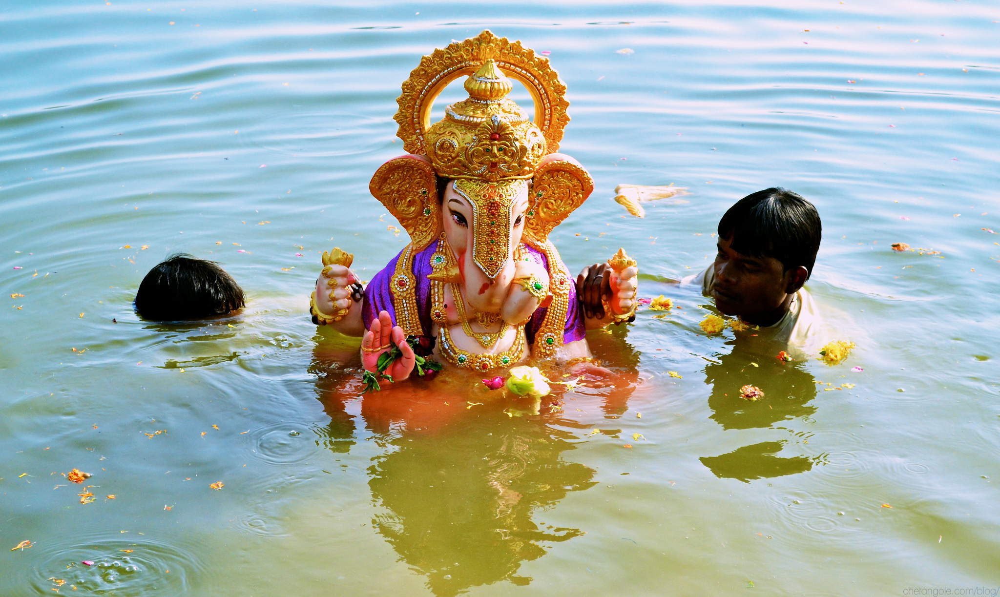 Ganesh Visarjan 2012